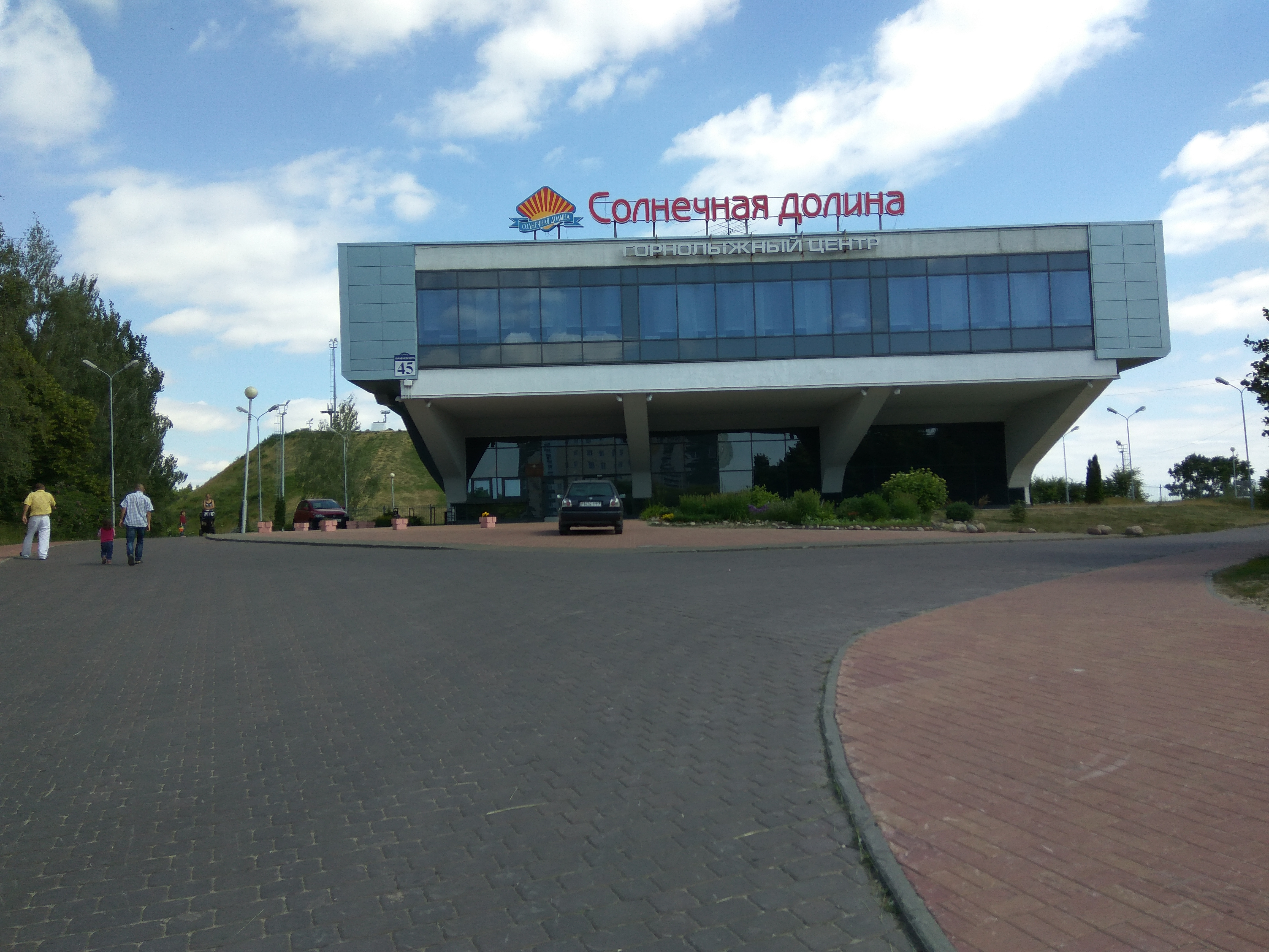 Мінск. Парк Курасоўшчына. Сонечная даліна